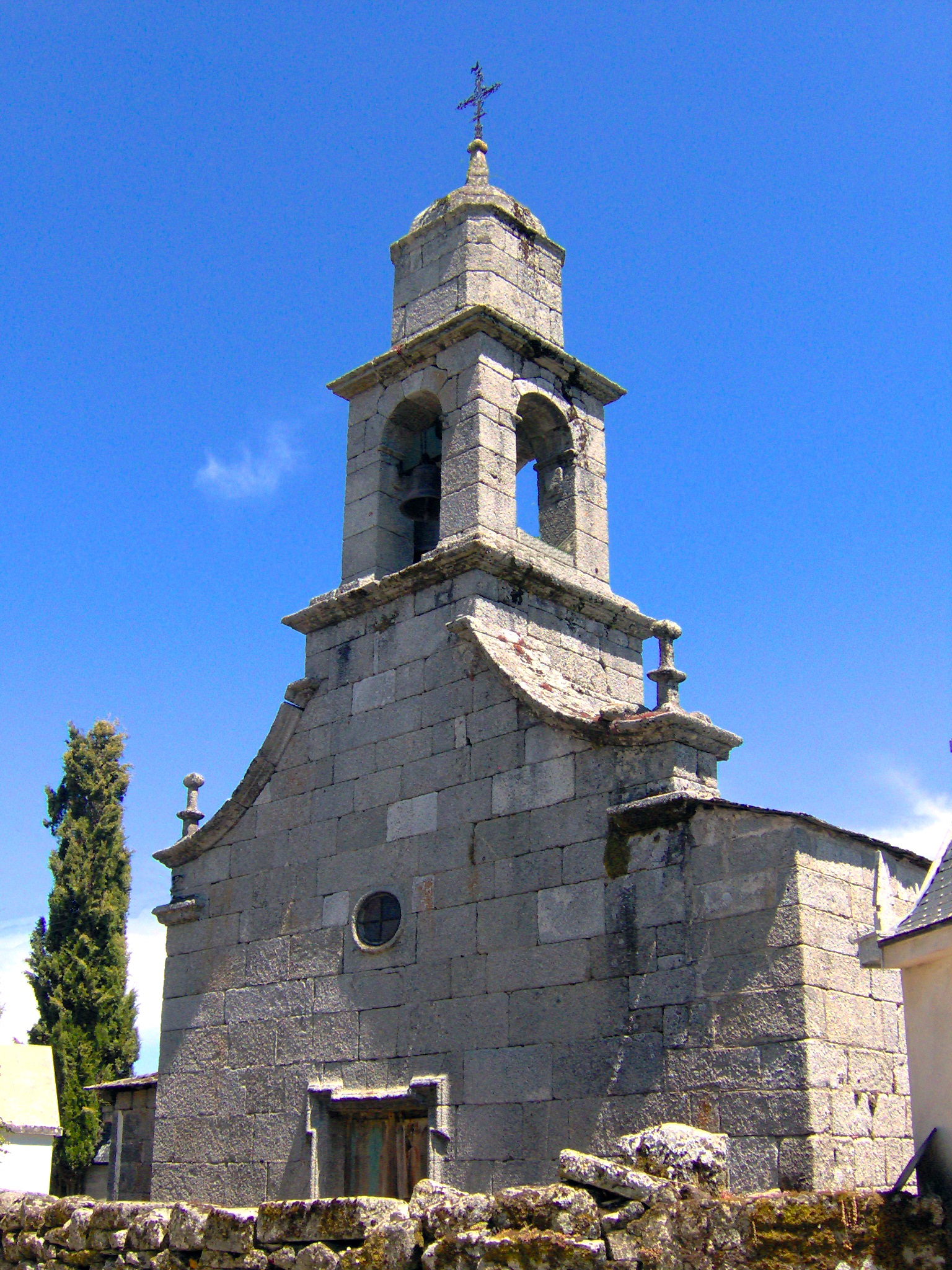 Igrexa de Santa María da Asunción, Castromao, A Veiga